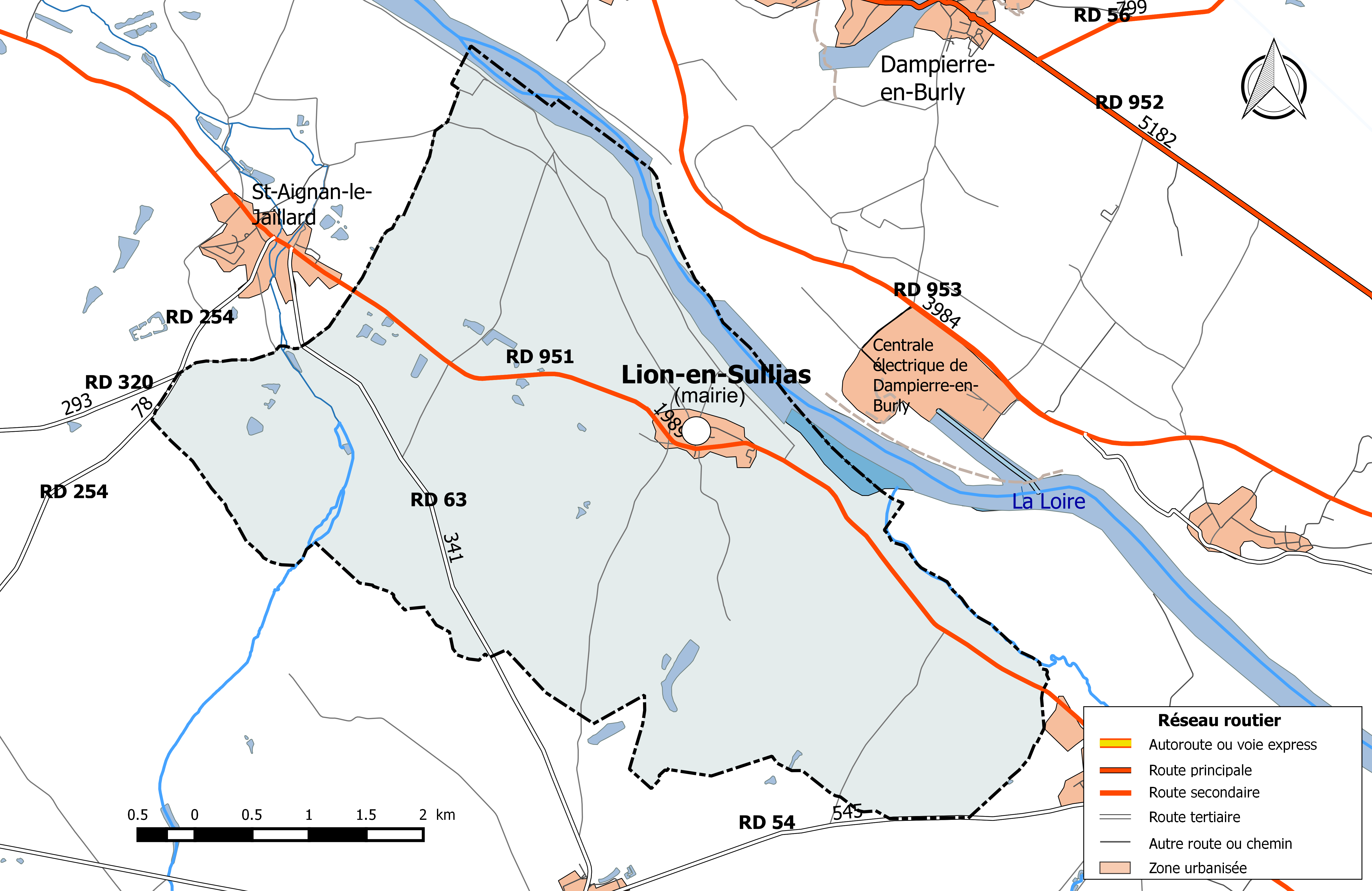 Carte du réseau routier de la commune de Lion-en-Sullias.